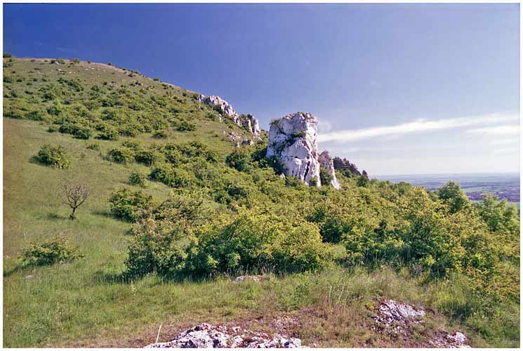 Skály na úbočí Stolové hory v přírodní rezervaci růžový vrch.